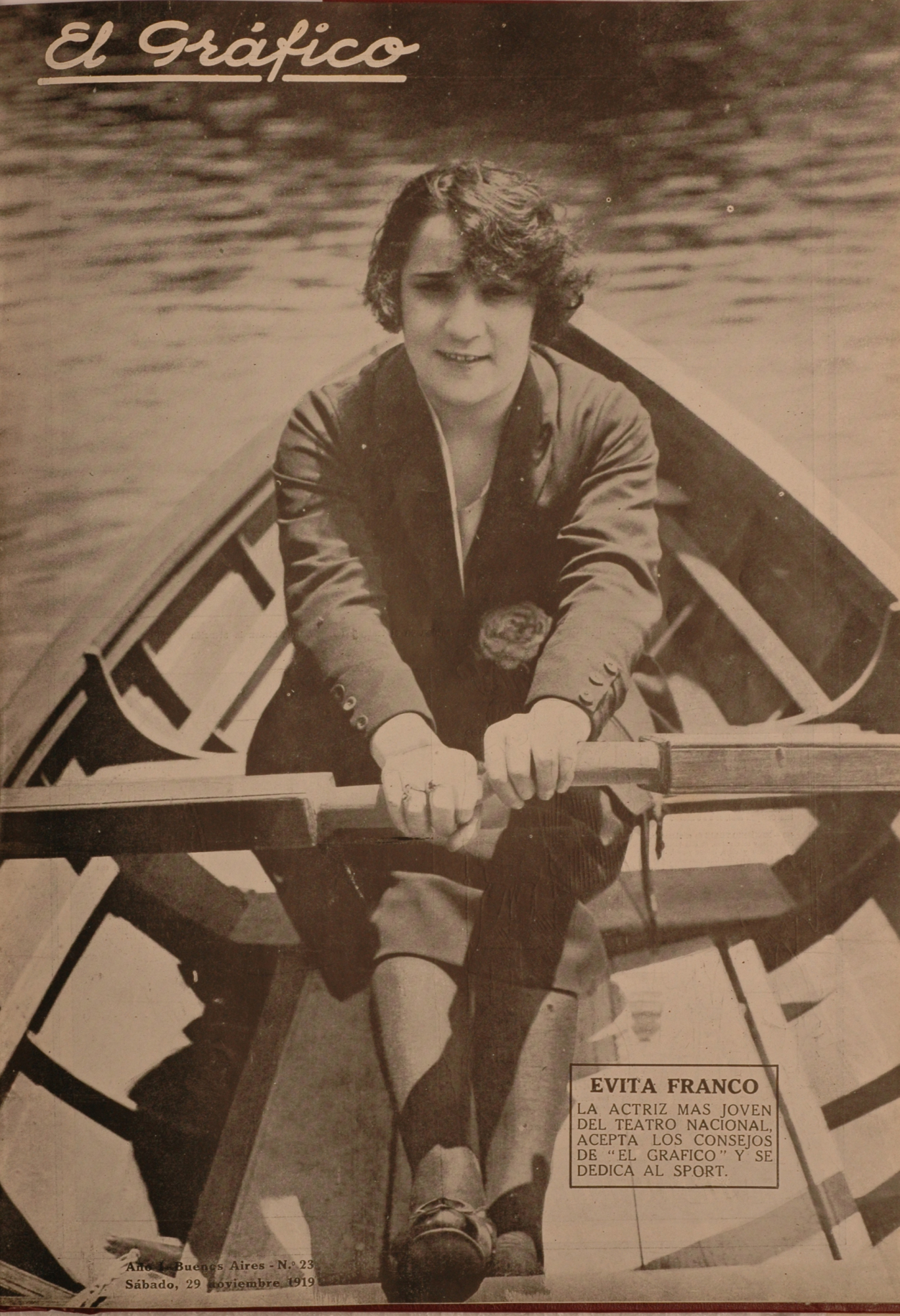 El Grafico del 29 de Noviembre de 1919. Edicion 23